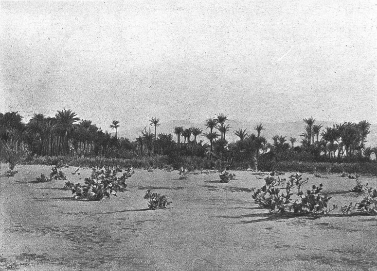 Mission Foureau-Lamy: Dattiers (Phœnix dactylifera) et Korunka (Calotropis procera) à Iferouane. Aïr.